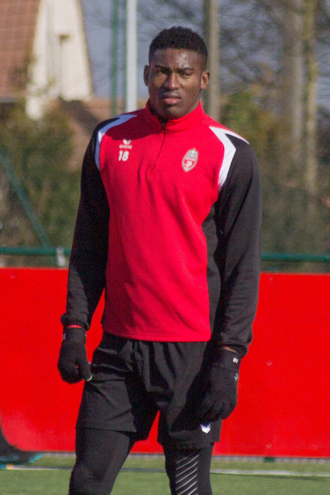 Entraînement du Royal Excel Mouscron, au Futurosport( Mouscron). Le 22 février 2018.